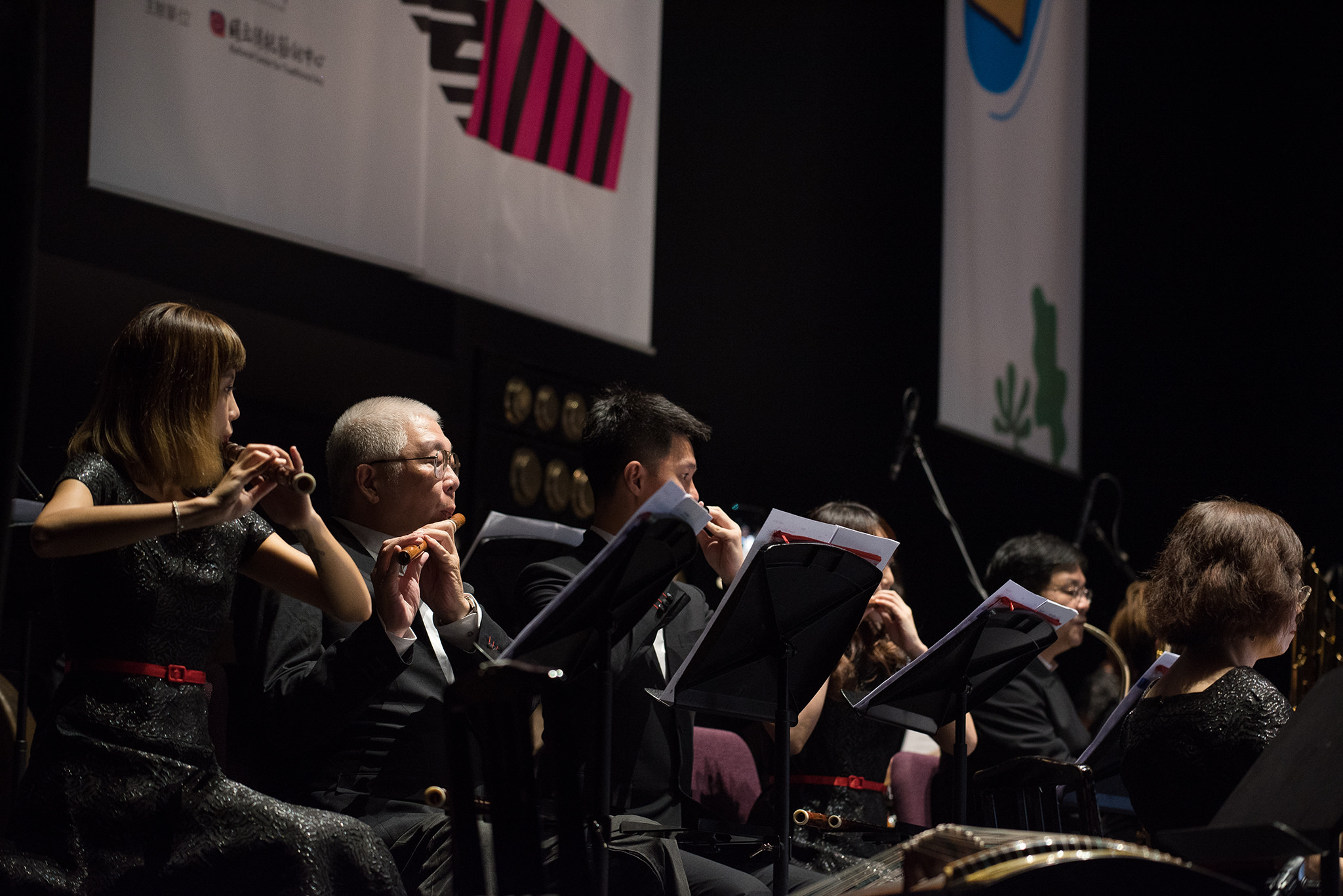 中文（台灣）: 國樂團中的吹管聲部：左一至左四為笛子（包含梆笛、曲笛、新笛等）；左五為高音笙